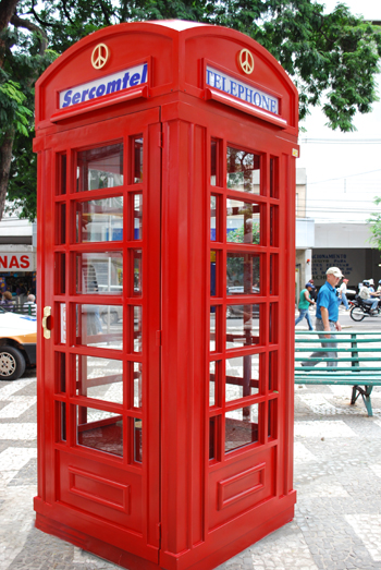 Imitação das cabines inglesas, intalada pela Sercomtel na cidade de Londrina, Paraná